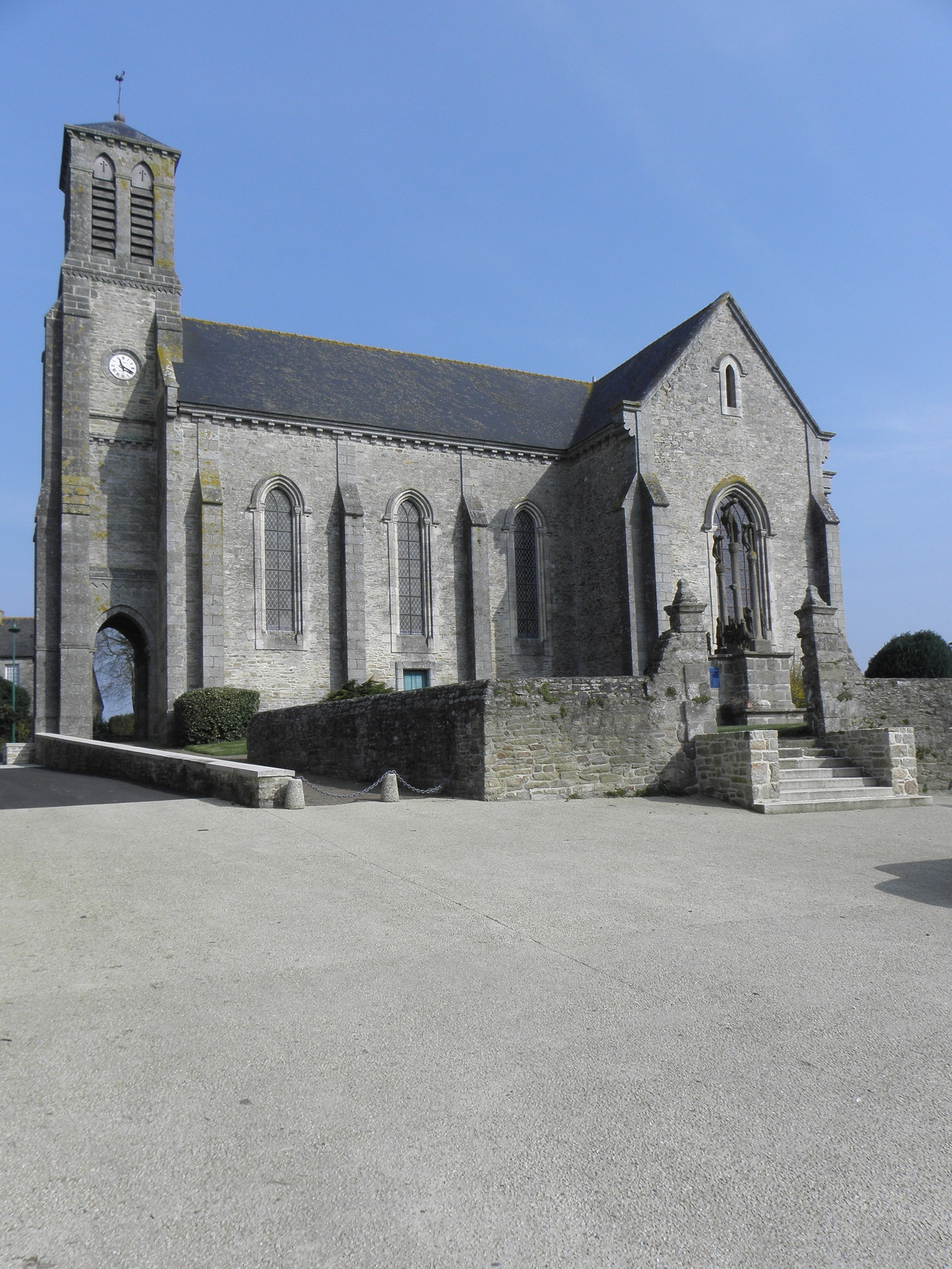 Église Notre-Dame à Senven-Léhart (22). Flanc sud et calvaire.